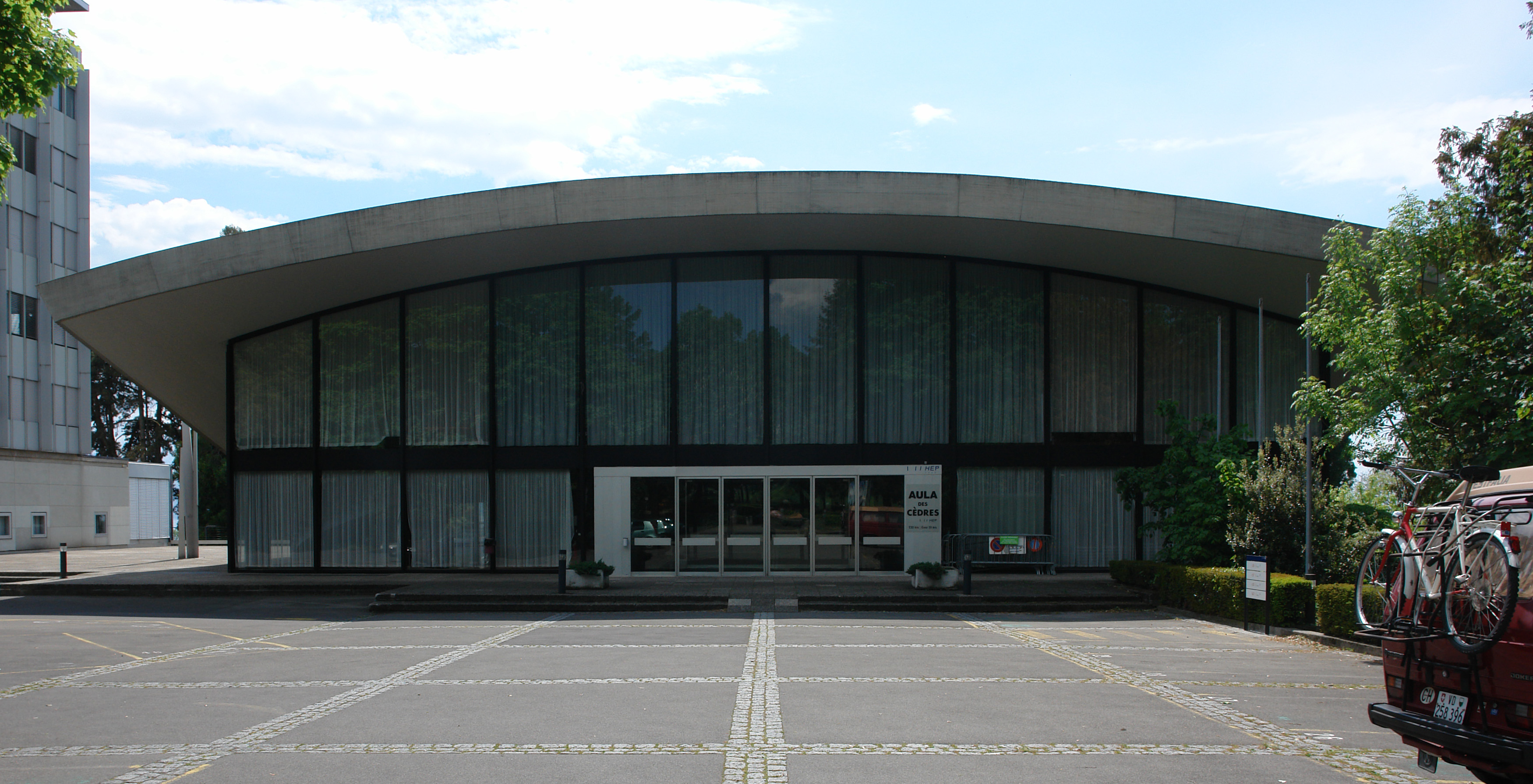 Auditorium of the Ecole Polytechnique Féderale de Lausanne, Main Facade